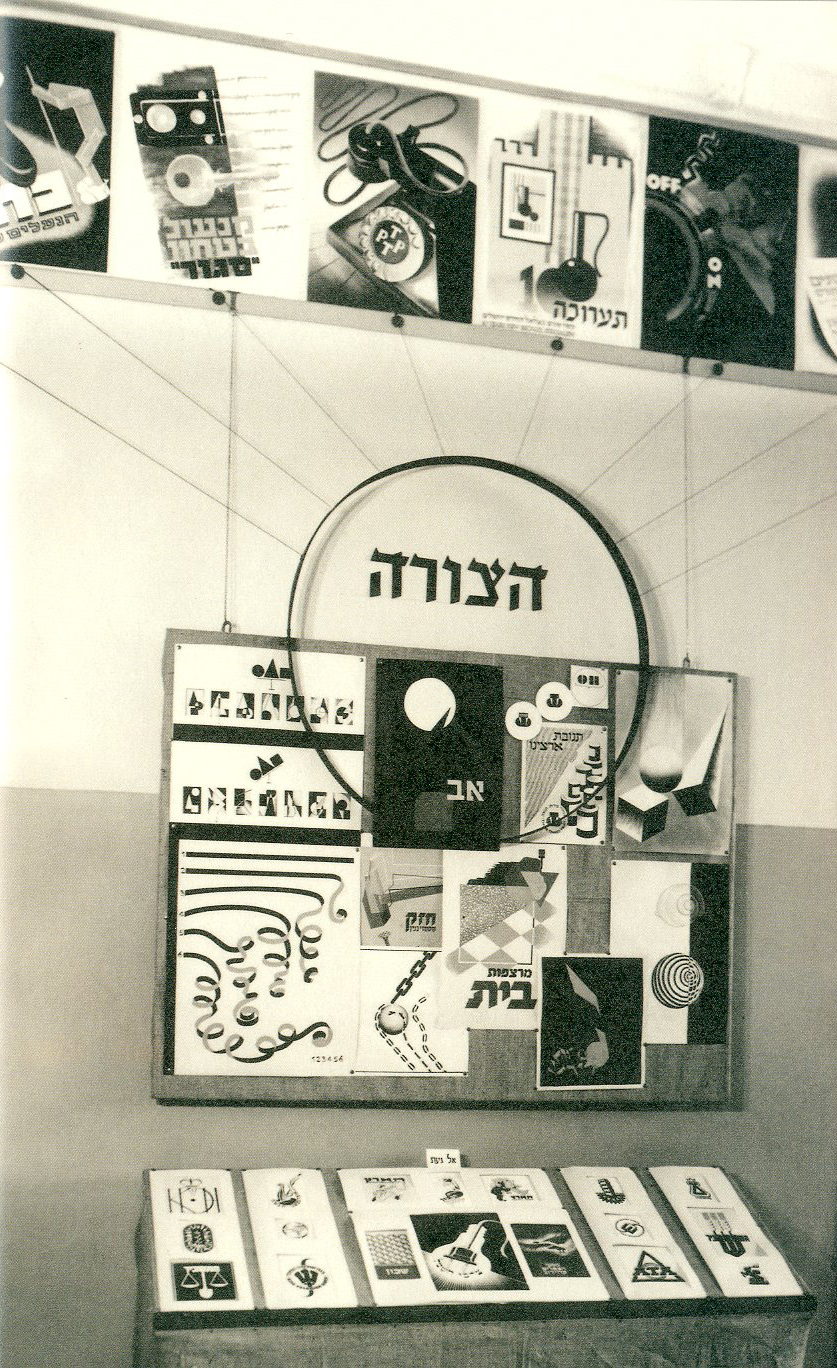 תערוכת בוגרי בצלאל, 1949. צילום: לו לנדאוור